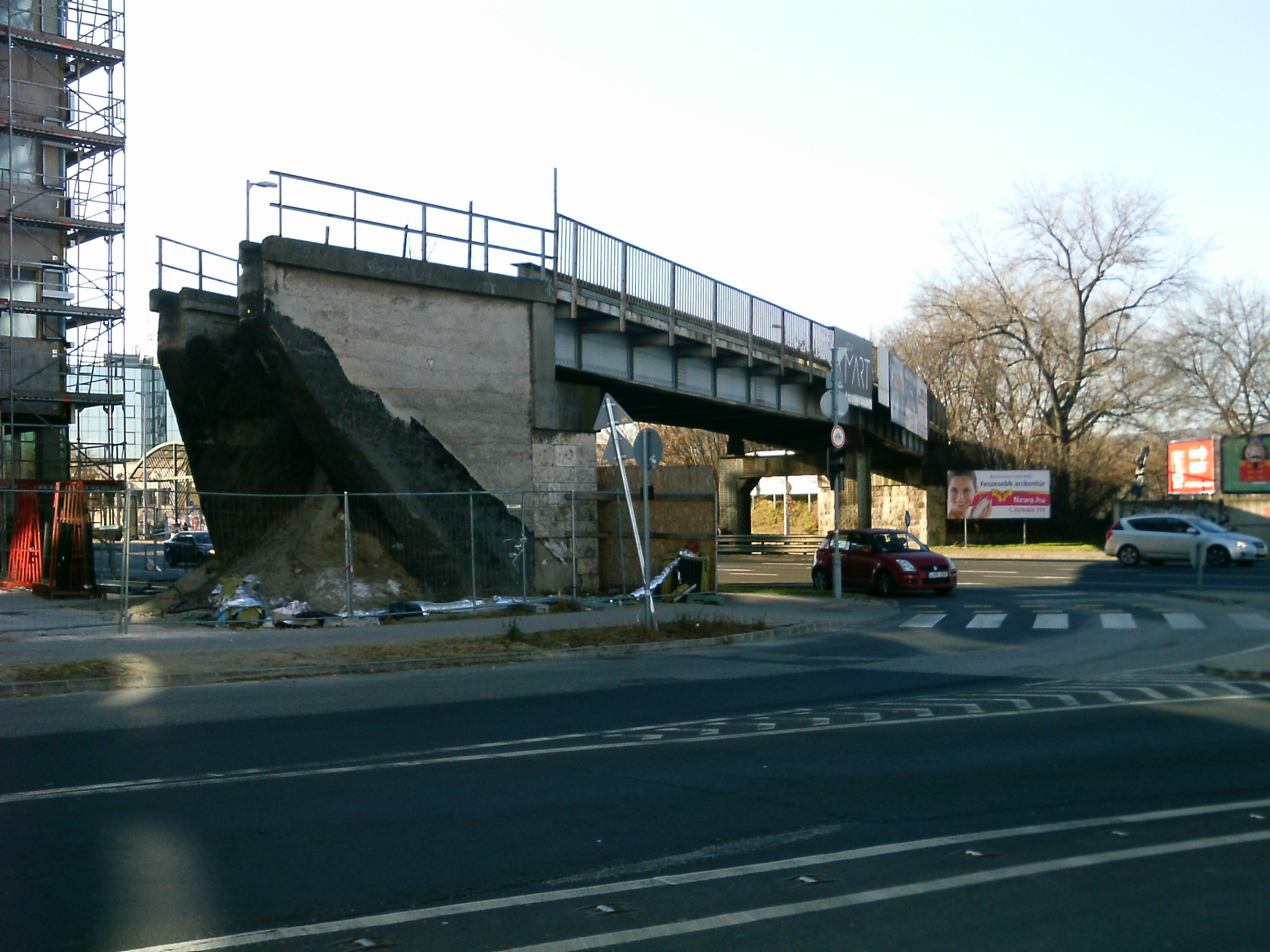 Az egykori Vizafogó vasút felüljárója a Váci út felett